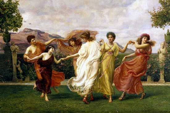 Horae Serenae